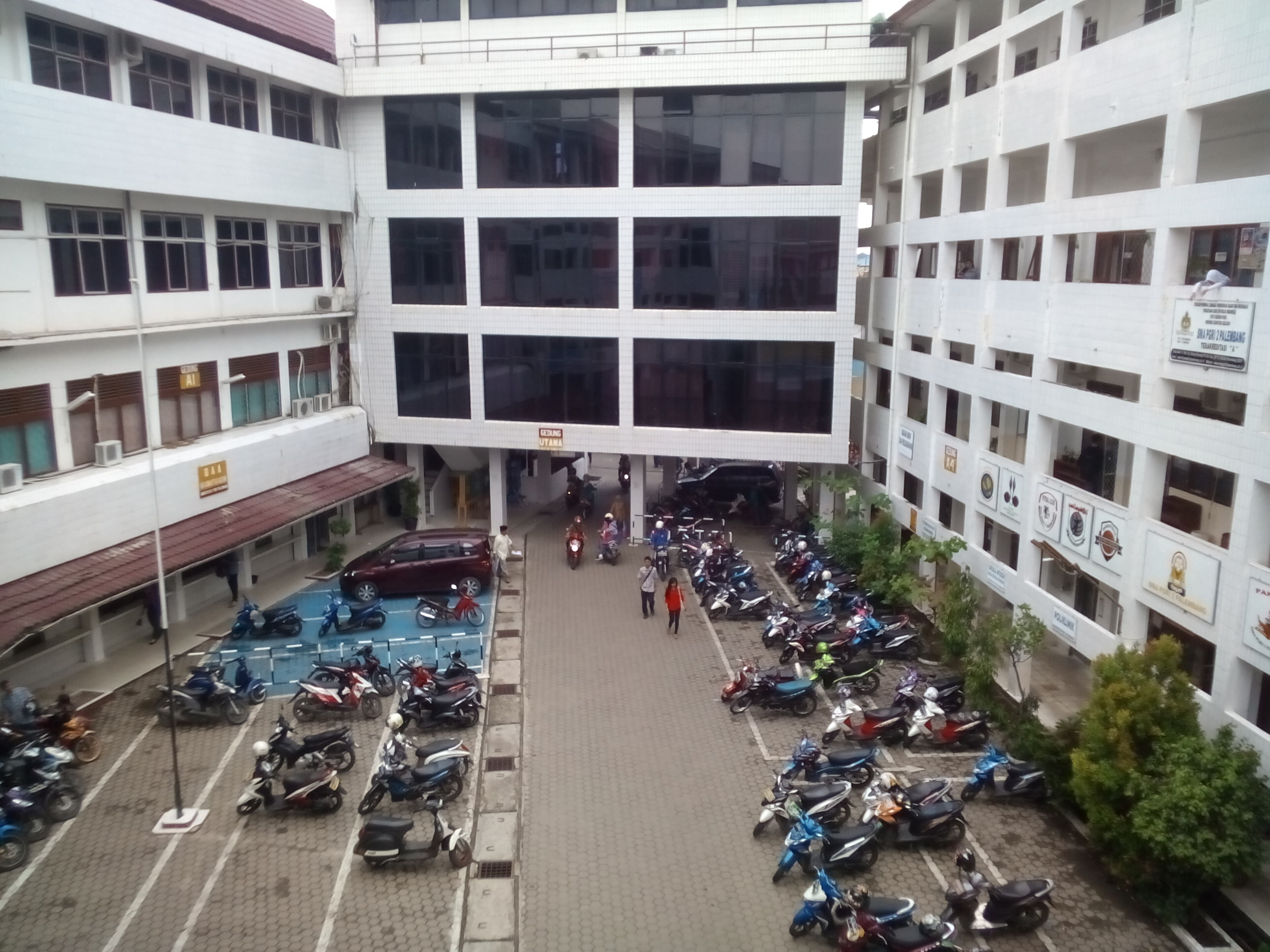 suasana saat siang hari di SMA PGRI 2 Palembang